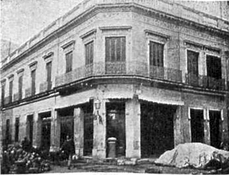 Casa donde se habría registrado el primer caso de la epidemia de fiebre amarilla en Buenos Aires, enero de 1871. Esquina sudoeste de las calles Uruguay y Bartolomé Mitre.